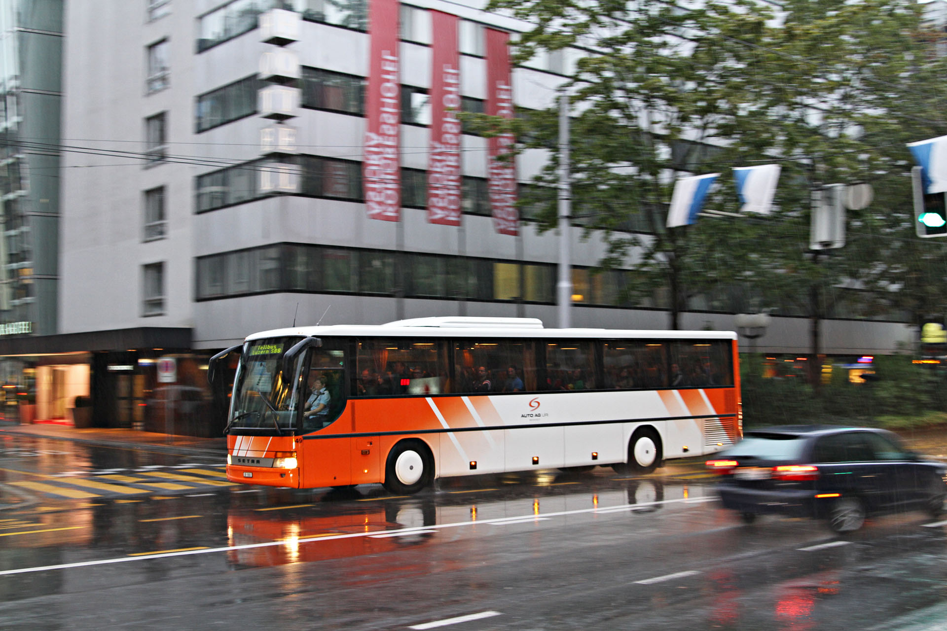 Ein Setra S 315 UL mit GT-Front der Auto AG Uri als Tellbus am 12. September 2012 auf der Luzerner Pilatusstrasse